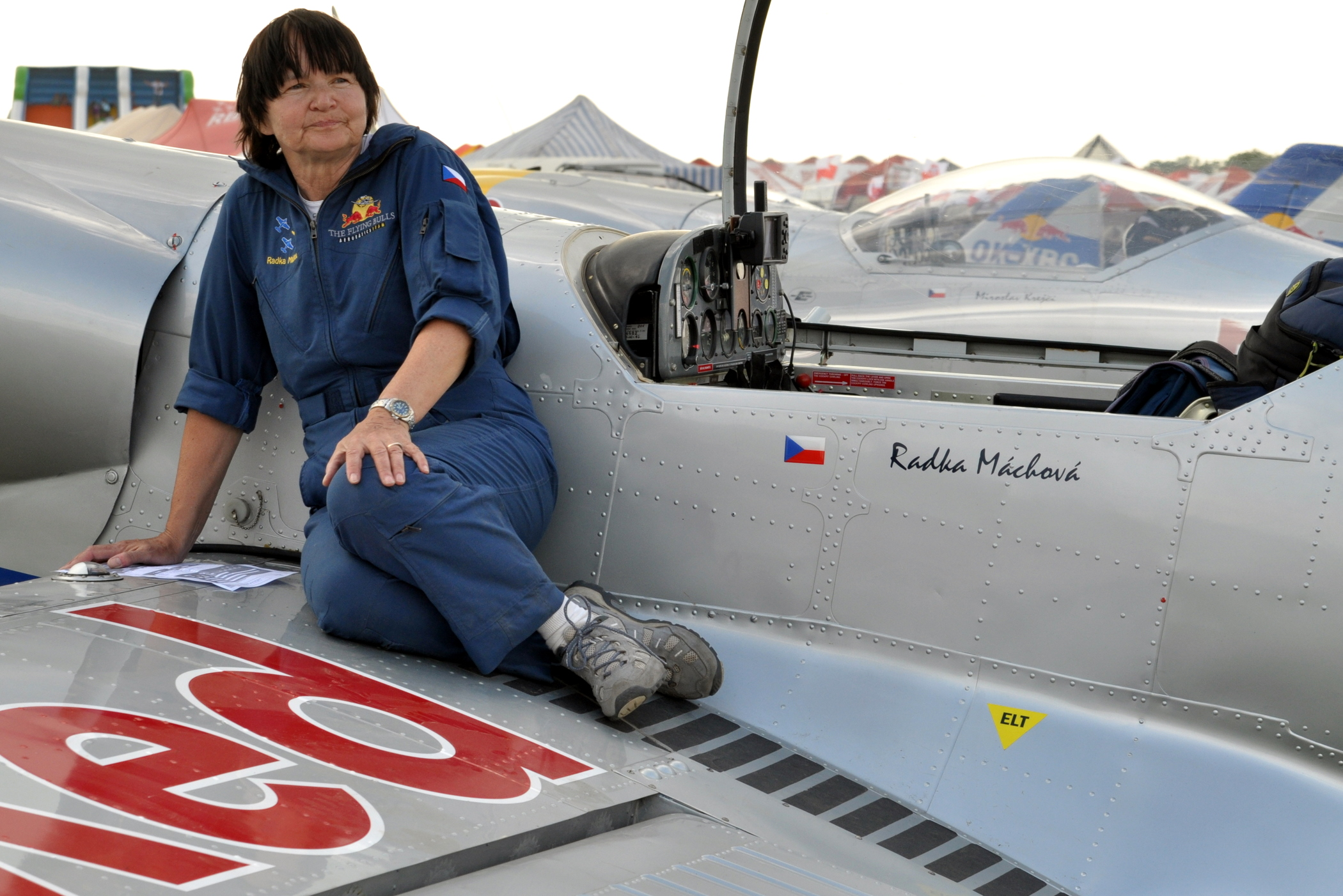 Česká akrobatická skupina Flying Bulls - Vůdcovství Radka Máchová (lider)